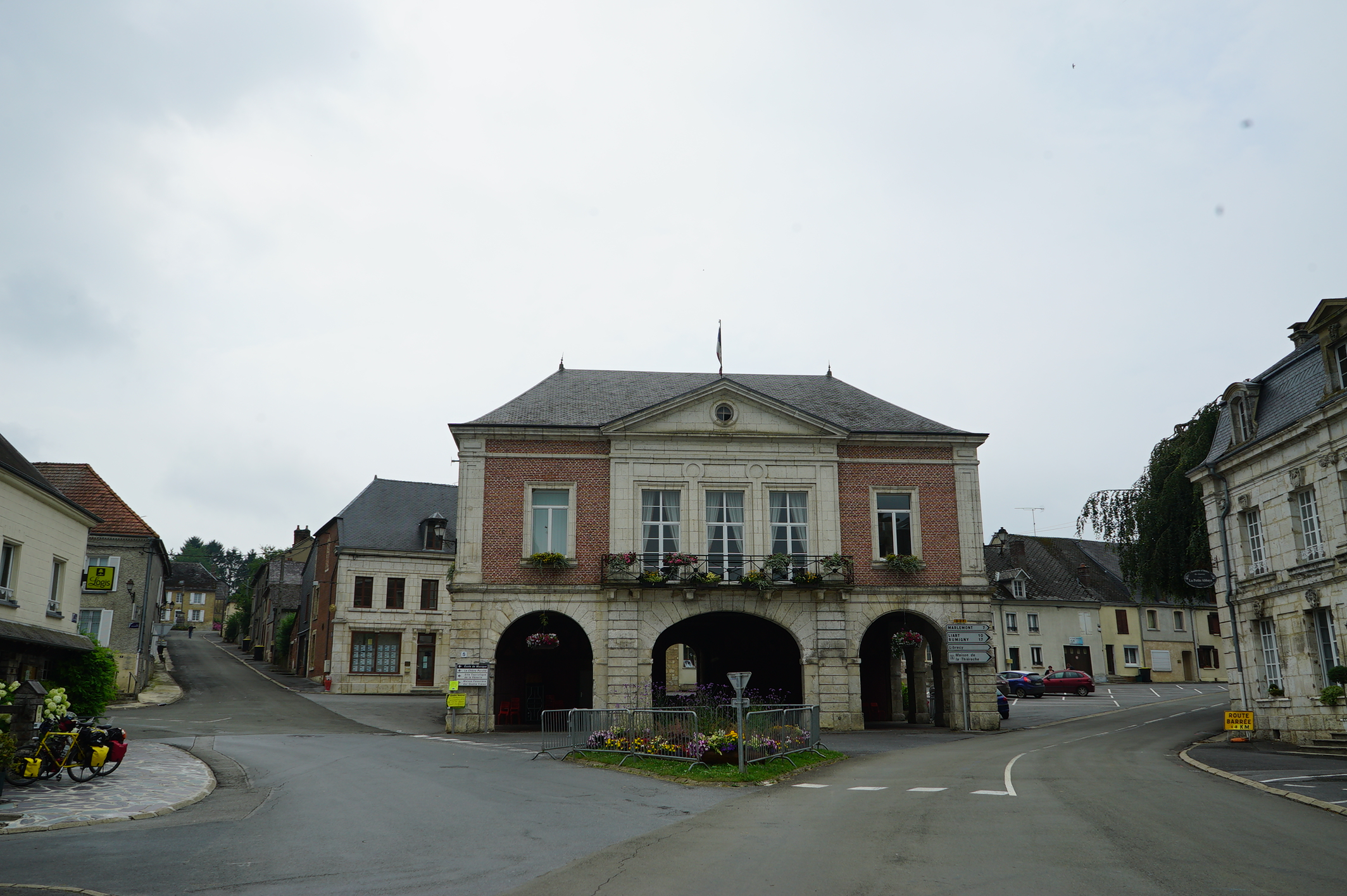 à signy-l'abbaye.